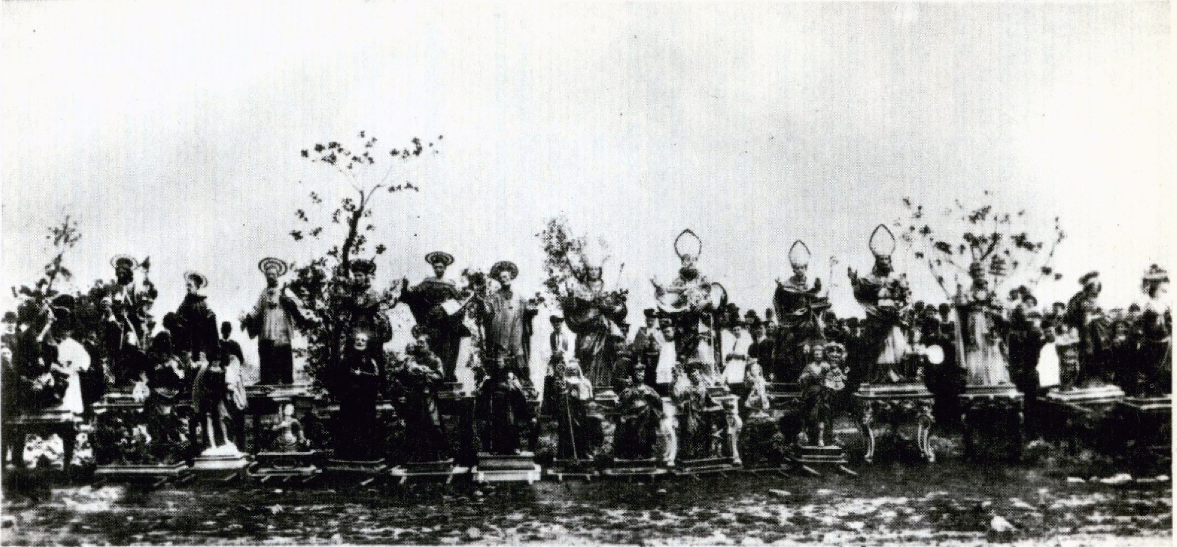 Processione in onore di San Cristanziano scattata precedentemente al 1890. Rappresenta tutte le statue di Agnone.